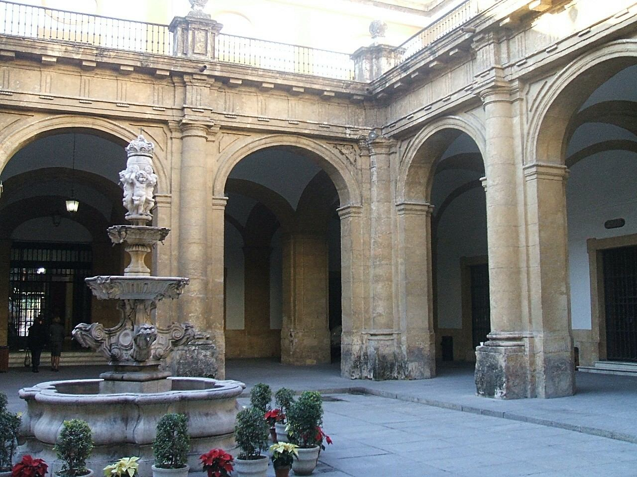 Patio de la Universidad de Sevilla (Facultad de Derecho)